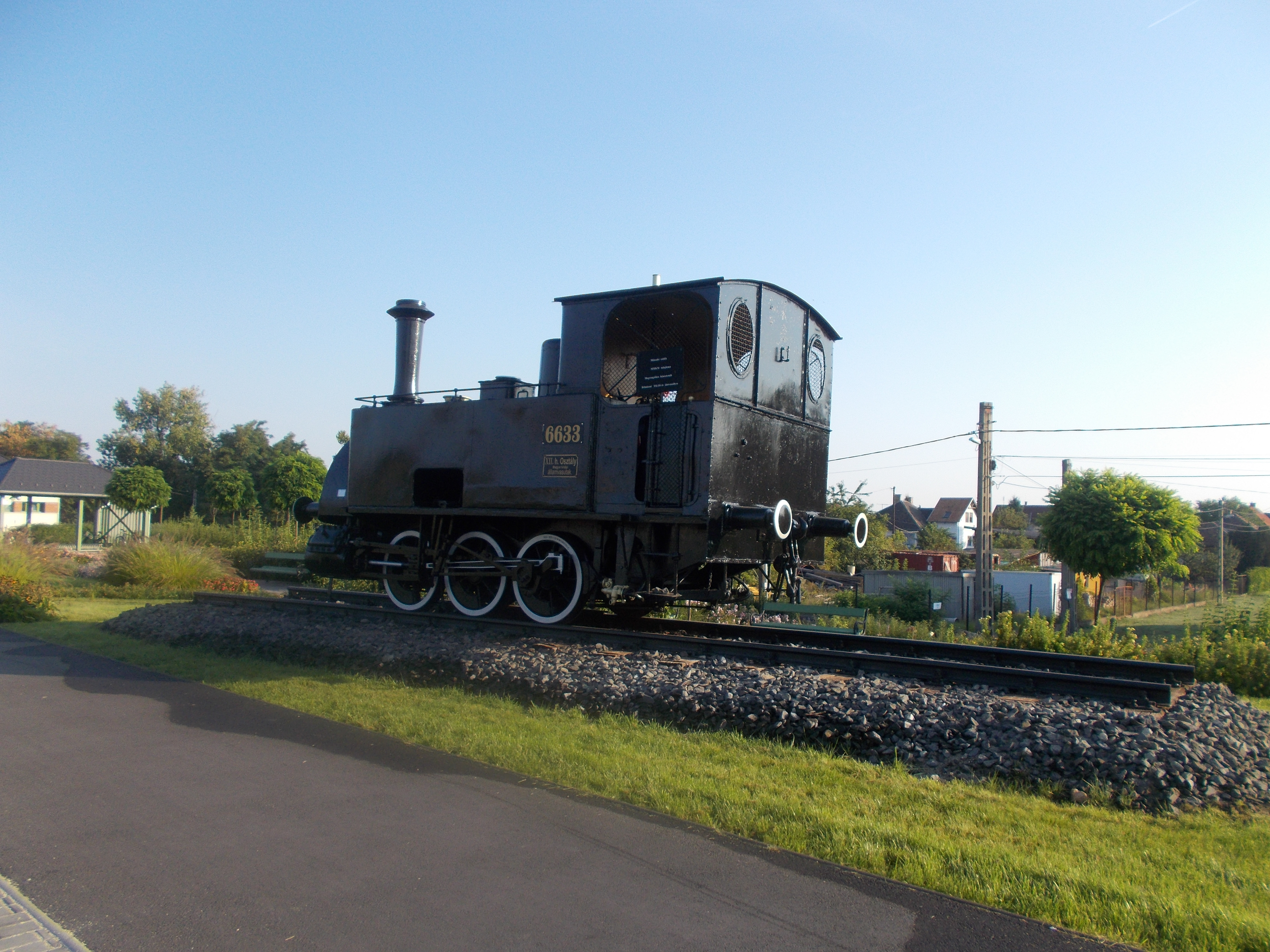 Kiállított mozdony Gyál felsőn